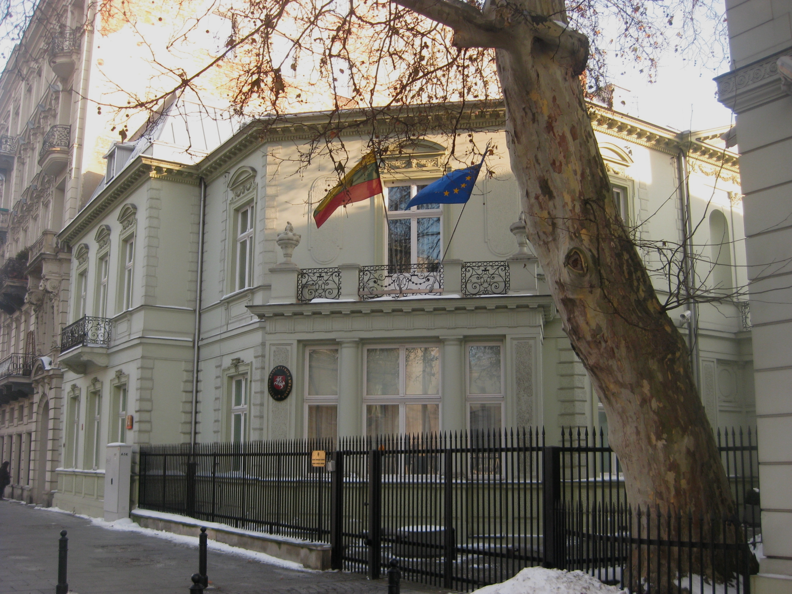 Warszawa, pałacyk Pod Karczochem